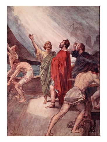 Illustrazione raffigurante Timoleonte di Corinto